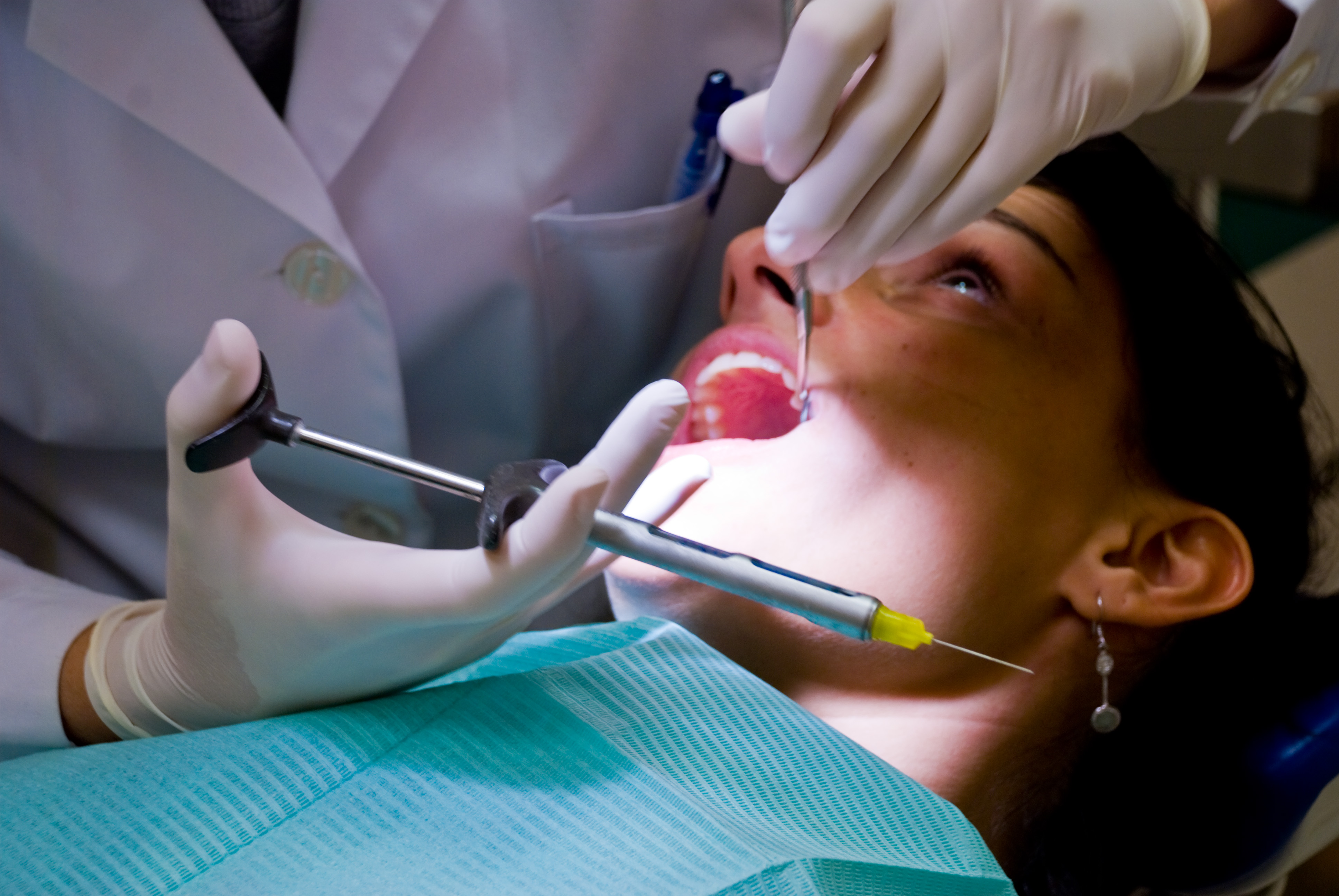 Un'odontoiatra sta per iniettare un anestetico nella gengiva di una sua paziente